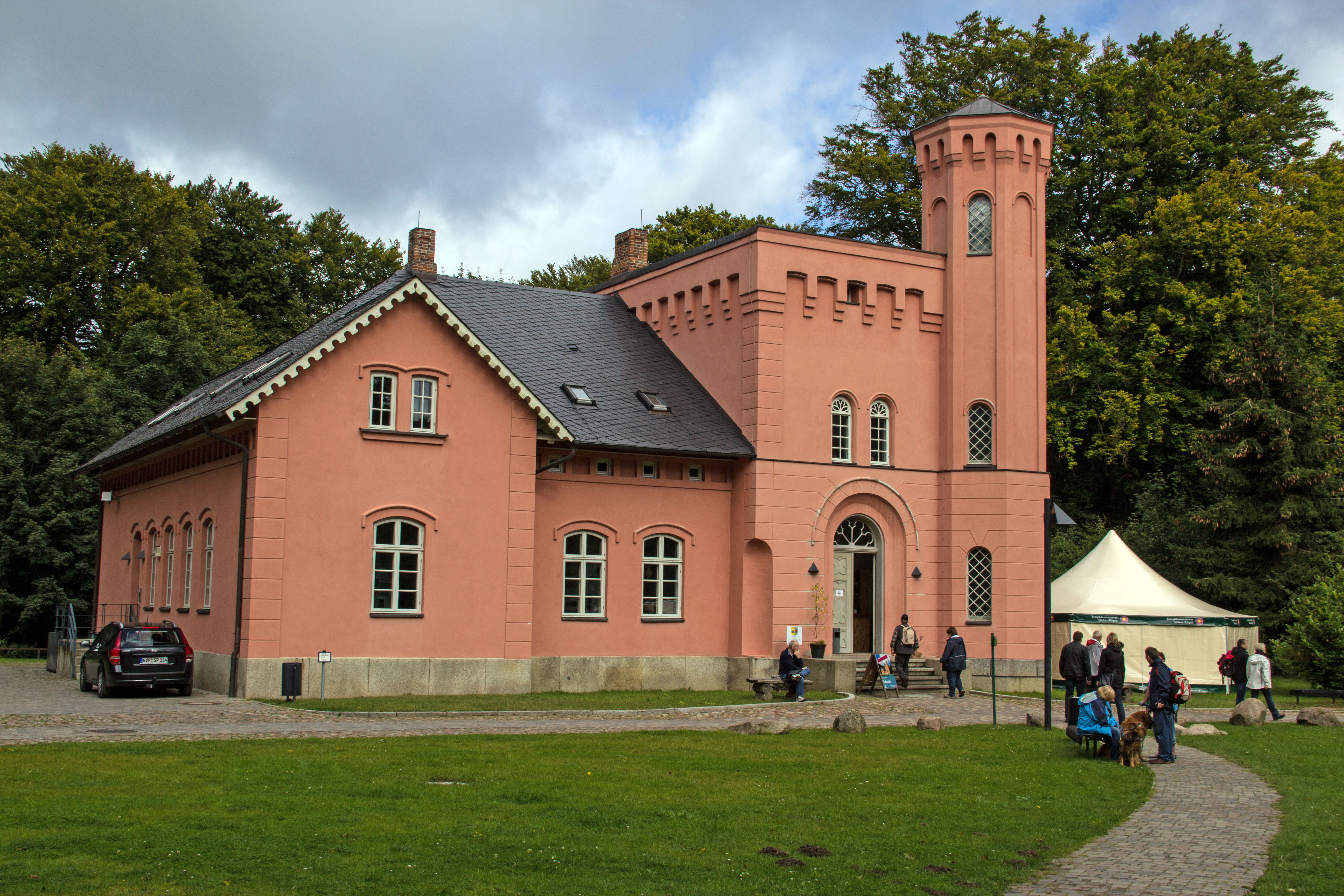 Granitzhaus von 1901, gegenüber vom Jagdschloss Granitz bei Binz auf der Insel Rügen, Vorpommern.